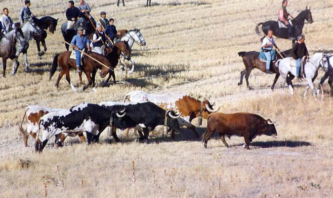 Encierros camperos celebrados anualmente en el municipio de Vallelado (Segovia) con motivo de sus fiestas en honor a la "Exaltación de la Cruz" sobre el 14 de cada mes de septiembre.